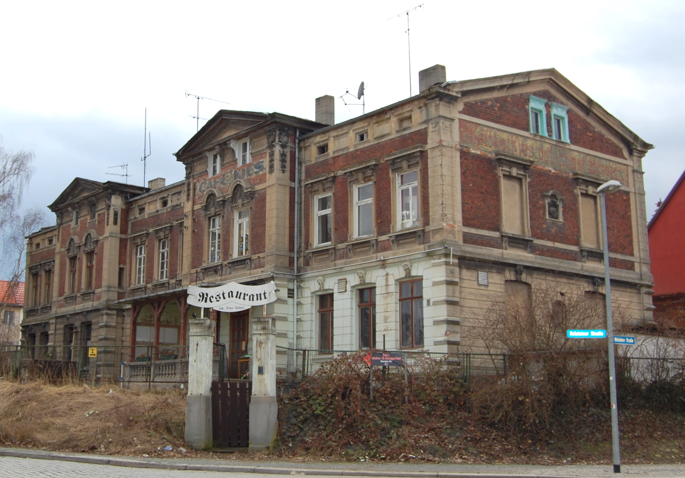 Cafe Kies in Magdeburg-Westerhüsen